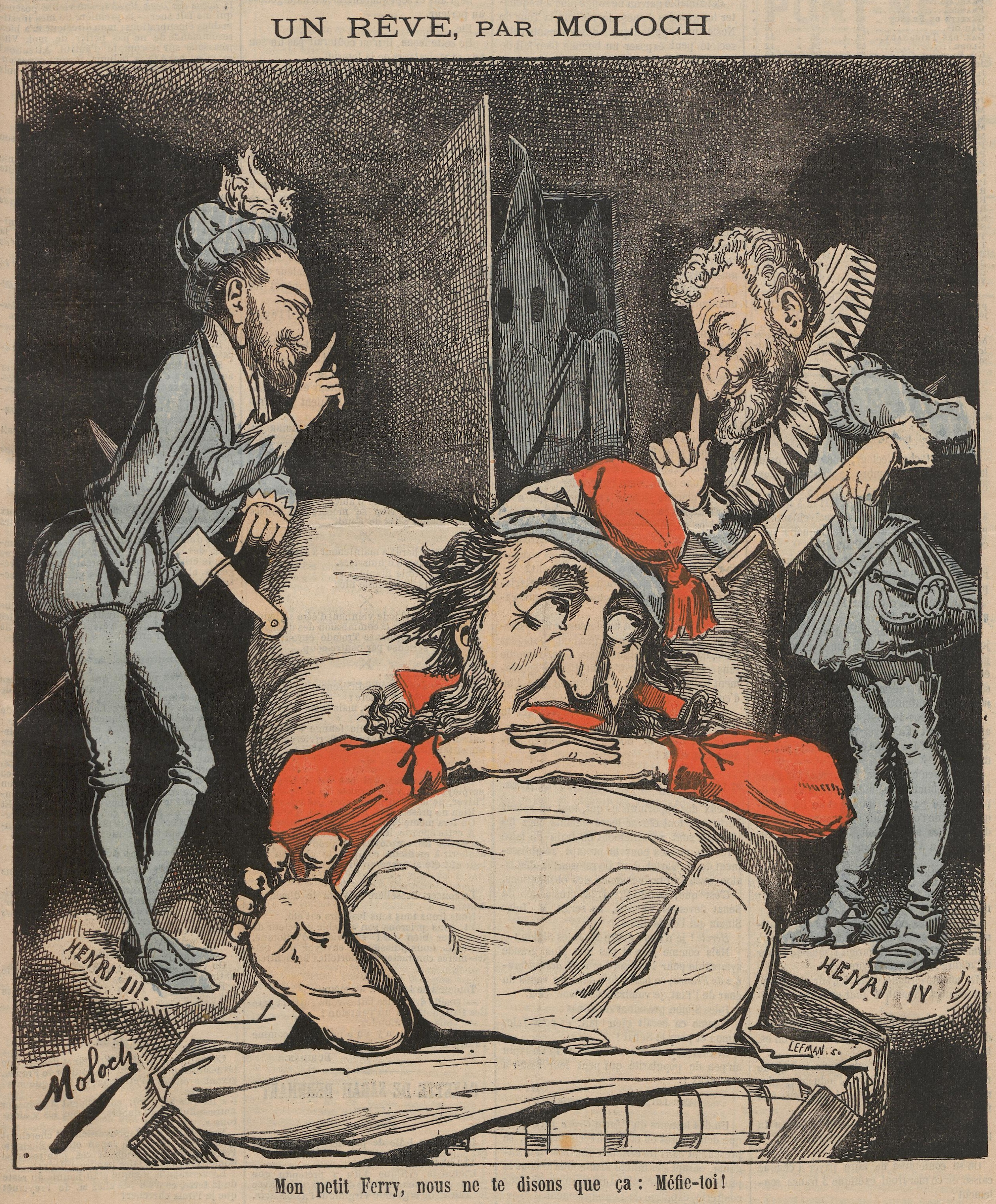 Caricature représentant Jules Ferry averti en rêve par Henri III et Henri IV (tous deux possiblement assassinés sur ordre des Jésuites) qu'il va connaître la même fin.